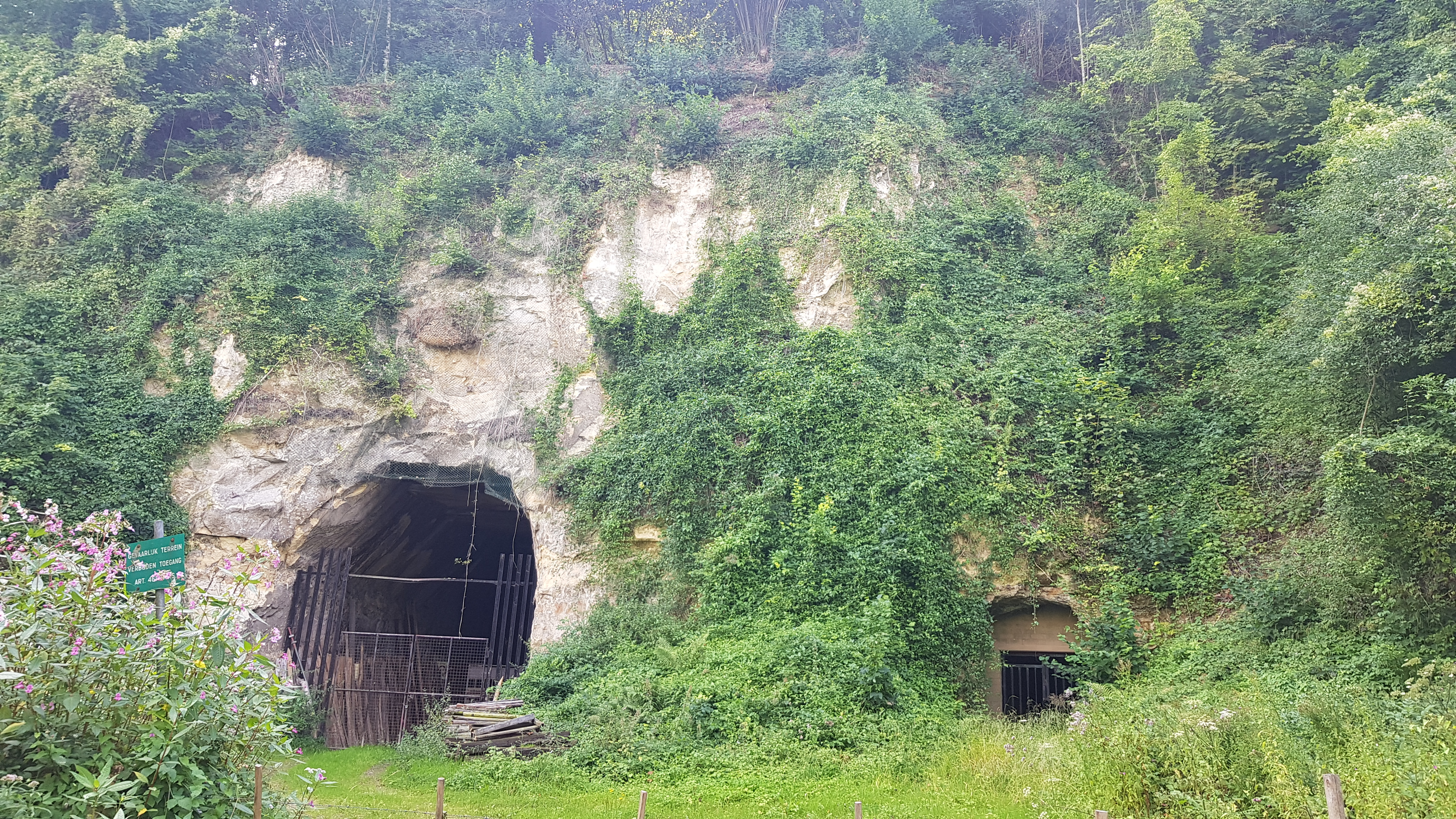 Ster van Parijs + Bonsdalgroeve oost, Bronsdaelgroeve, Geulhem, Nederland